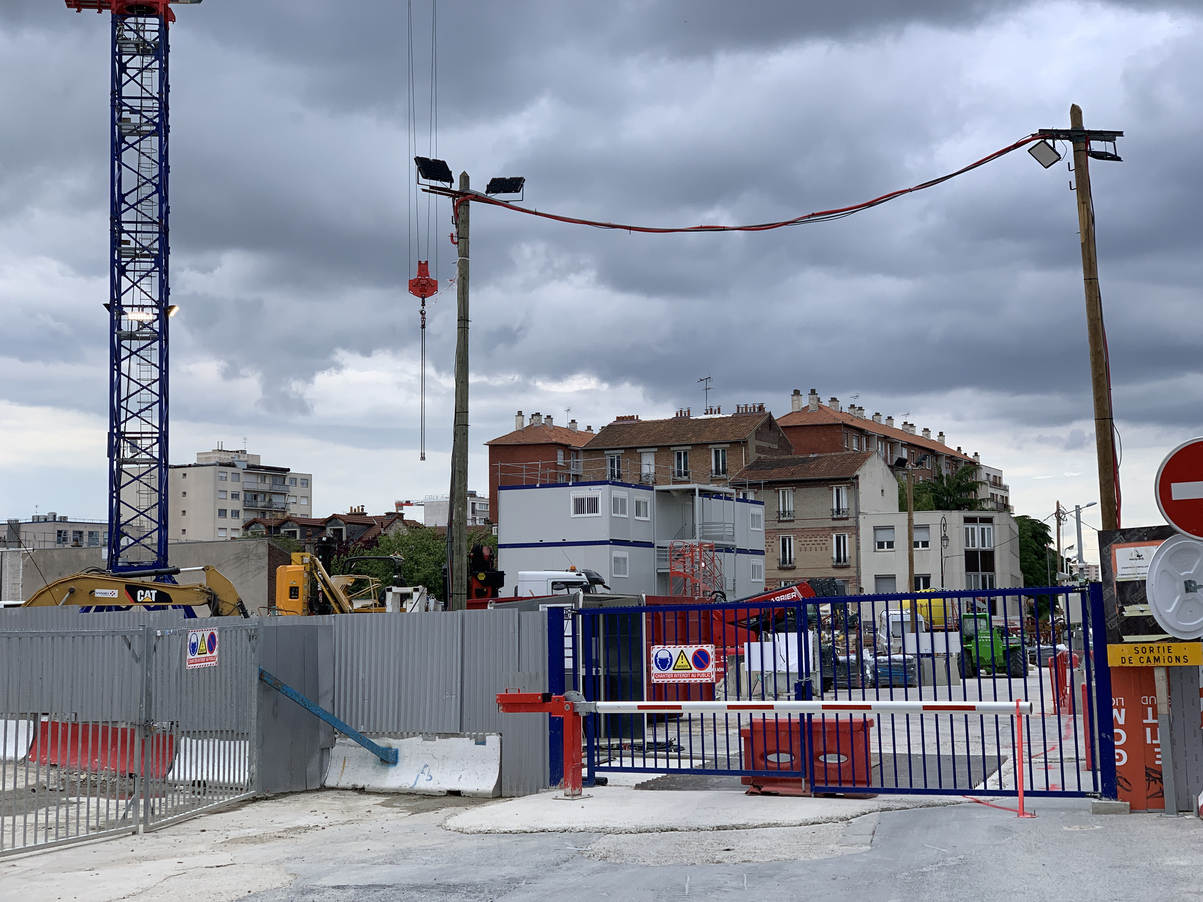 Chantier de la station de métro Châtillon - Montrouge, ligne 15 du métro de Paris, Châtillon, Hauts-de-Seine.